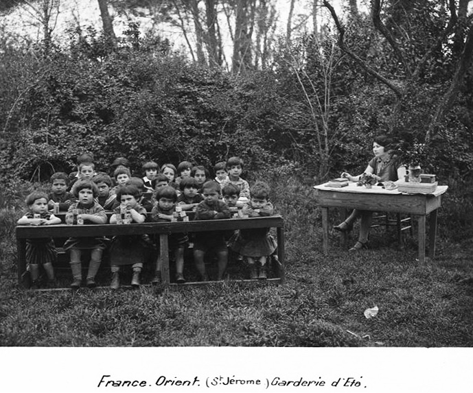 TFO Garderie d'été vers 1930 Coll. A. Tchouhadjian